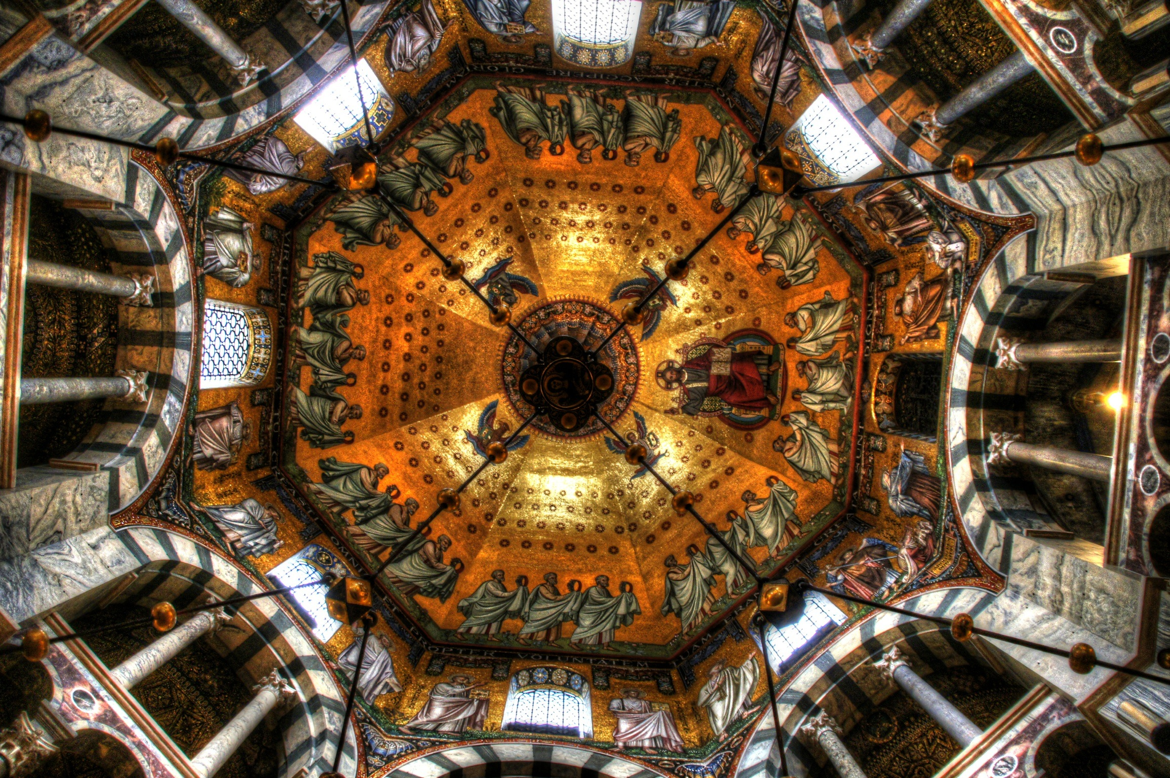 Die Anfänge des Doms gehen auf das 800 JH und auf Kaiser Karl den Großen zurück. Das im Bilde zu sehende Oktogons steht im Zentrum des Doms, wurde nach 790 nach byzantinischem Vorbild errichtet. Es war die Pfalzkapelle Kaiser Karls des Großen. Alle weiteren Teile des Domes wurden in den nächsten Jahrhunderten um sie herumgebaut. Der im Gewölbe an einer langen Kette hängende riesige Kronleuchter ist der sogenannte Barbarossa Leuchter. Er ist ein Stiftung Kaiser Friedrichs I (Barbarossa) und seine Frau Beatrix. Er wurde zwischen 1165 und 1170 gefertigt, misst 4,2 m im Durchmesser, hat 48 Kerzen und ist aus vergoldeten Kupfer gefertigt. Heribert Pohl